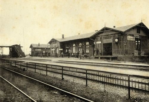 Das Bild zeigt den Bahnhof Büderich bei Wesel im Jahre 1910. Das Bild stammt von folgender Seite